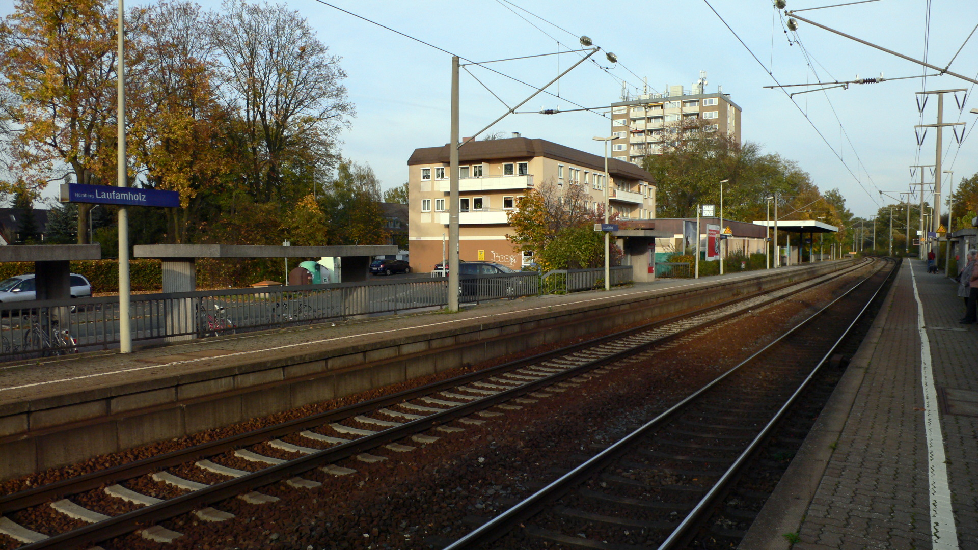 Haltepunkt Nürnberg-Laufamholz, Blick auf den Bahnsteig Richtung Nürnberg Hbf